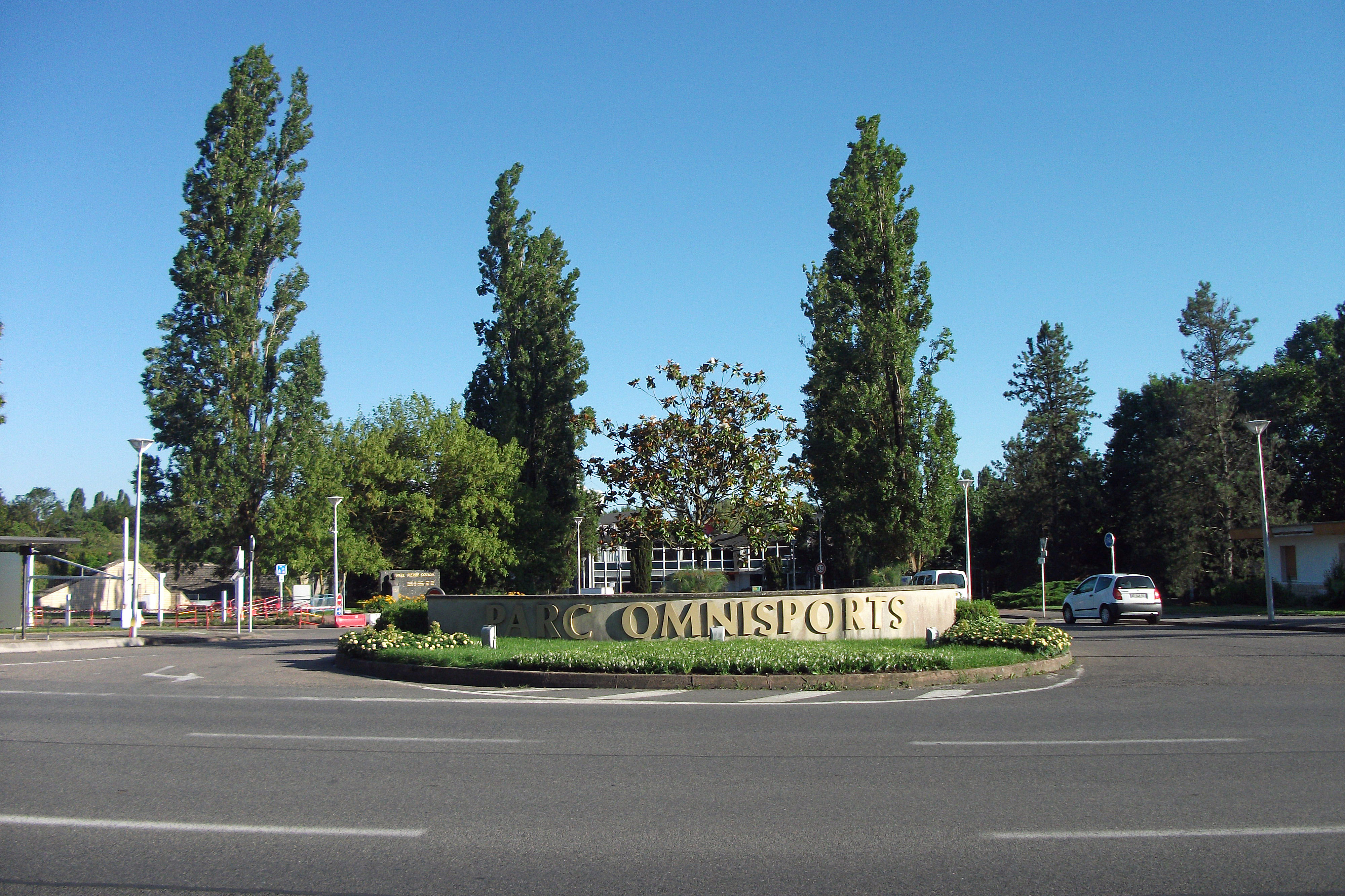 Entrée du parc omnisports de Vichy sur la commune de Bellerive-sur-Allier.